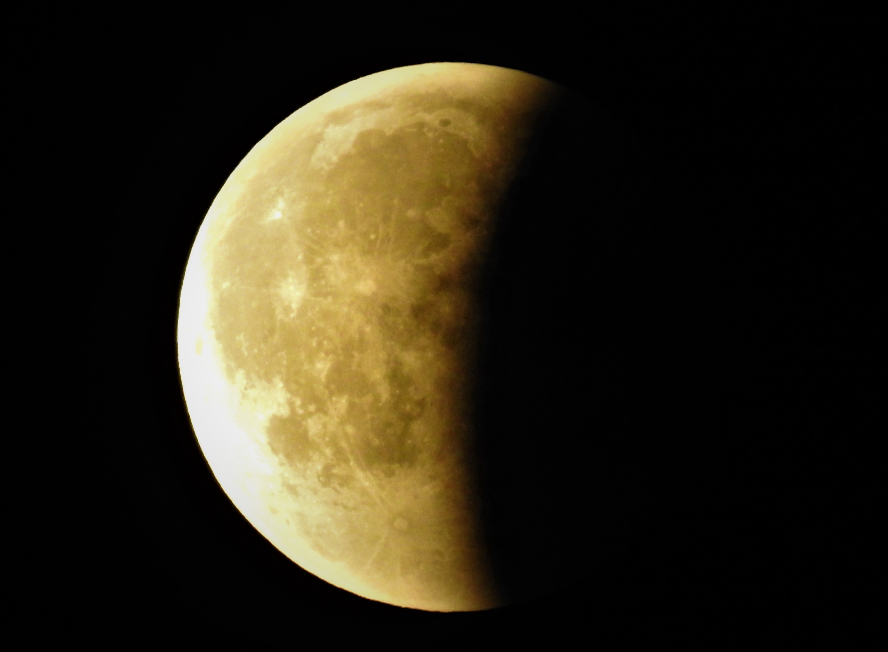 Holdfogyatkozás Magyarországról (Békés megye, Elek város)